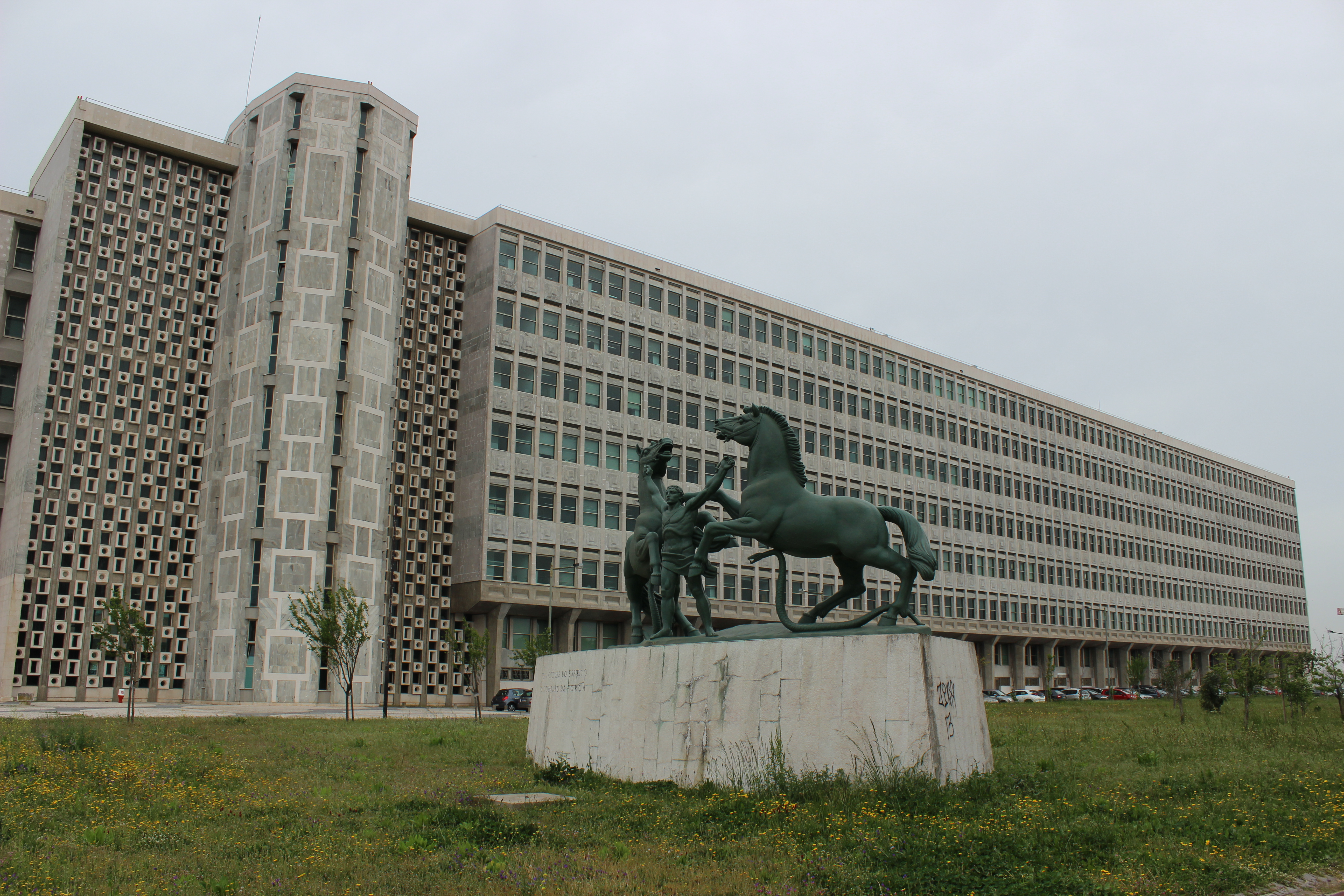 O Direito Dominado pela Força "A Justiça" através de dois cavalos e figura feminina, assentes sobre base de pedra, na qual pode ler-se a seguinte inscrição: PELA CULTURA DO ESPÍRITO/O DOMÍNIO DA FORÇA. Executada por Leopoldo de Almeida, foi inaugurada,em 1982, junto ao Palácio da Justiça. Escultor - Leopoldo de Almeida